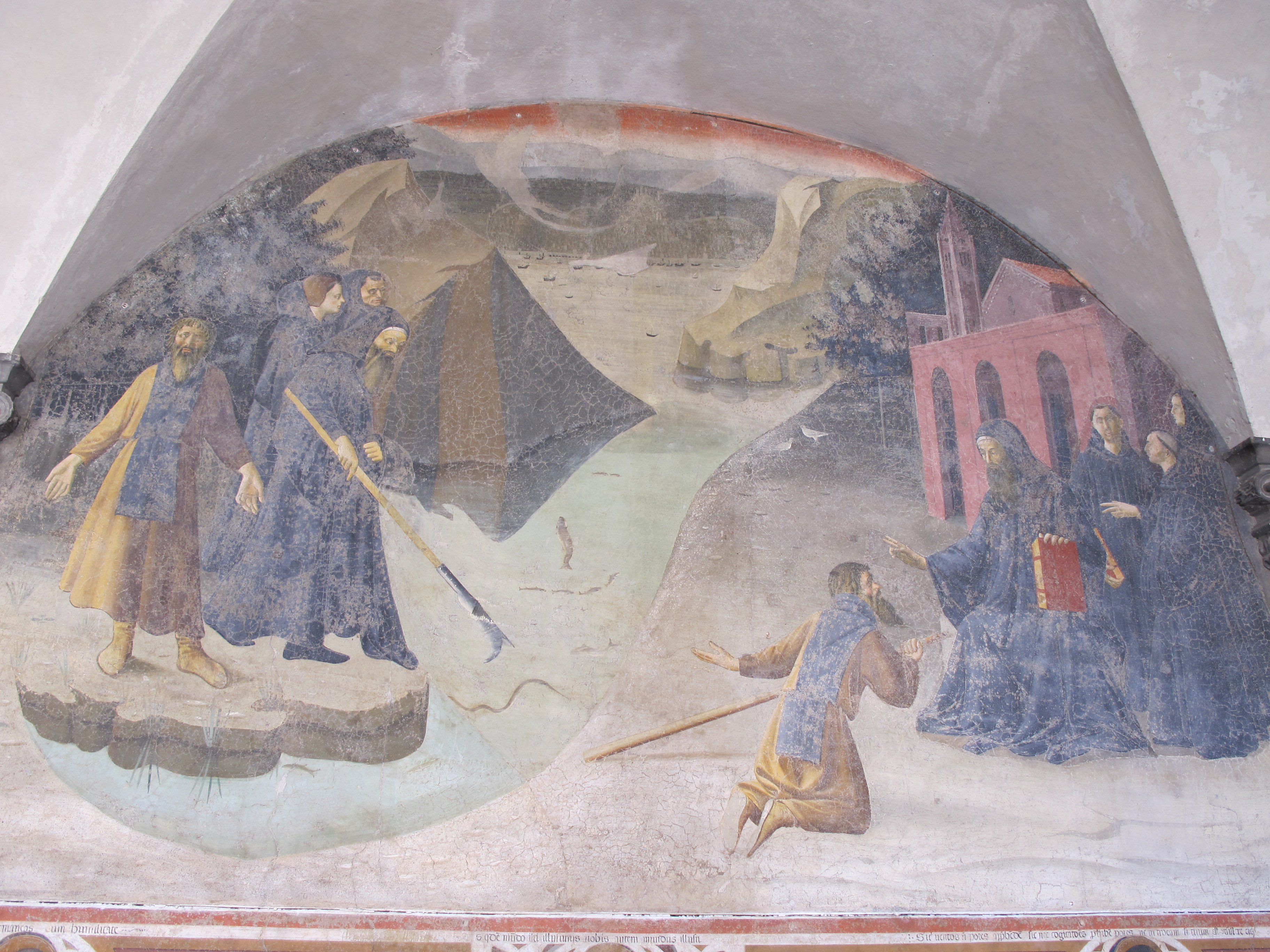 firenze 2011